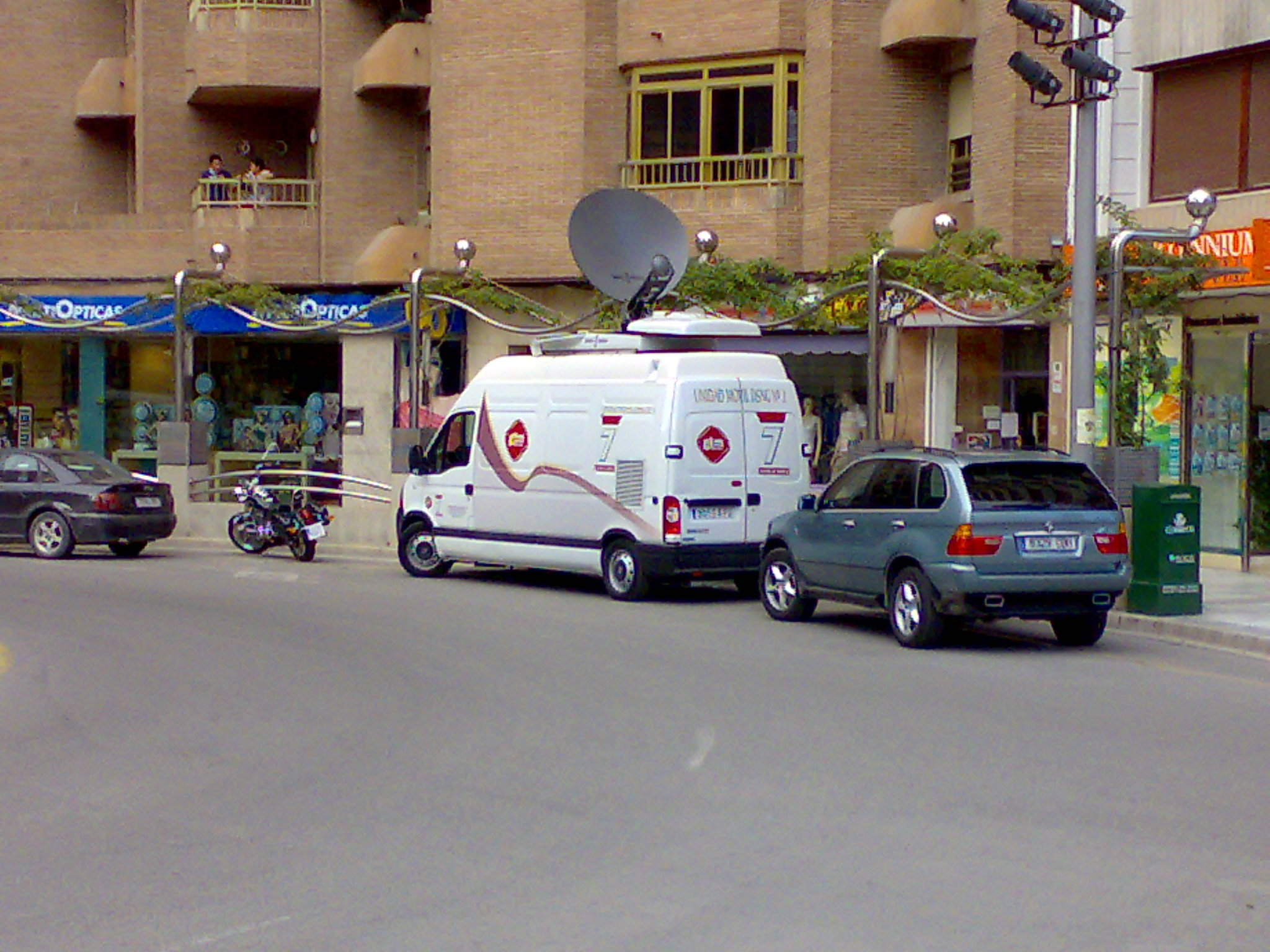 Una unidad móvil de la 7 Región de Murcia en el Ovalo Santa Paula, (Lorca)